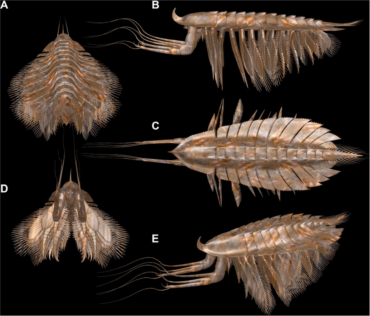 Three-dimensional model of Leanchoilia superlata Walcott, 1912 illustrating new interpretation of the morphology. A, Postero-dorsal view, note the position of the tergo-pleurae and the relatively narrow axial region; B, Lateral view, showing metachronal leg movement, note the slim body; C, Dorsal view; D, Antero-ventral view with strong median setation of appendages; E, Antero-dorso-lateral view; color of the model inspired by modern chelicerates.